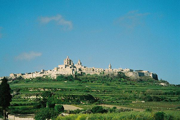 View on Mdina, Malta